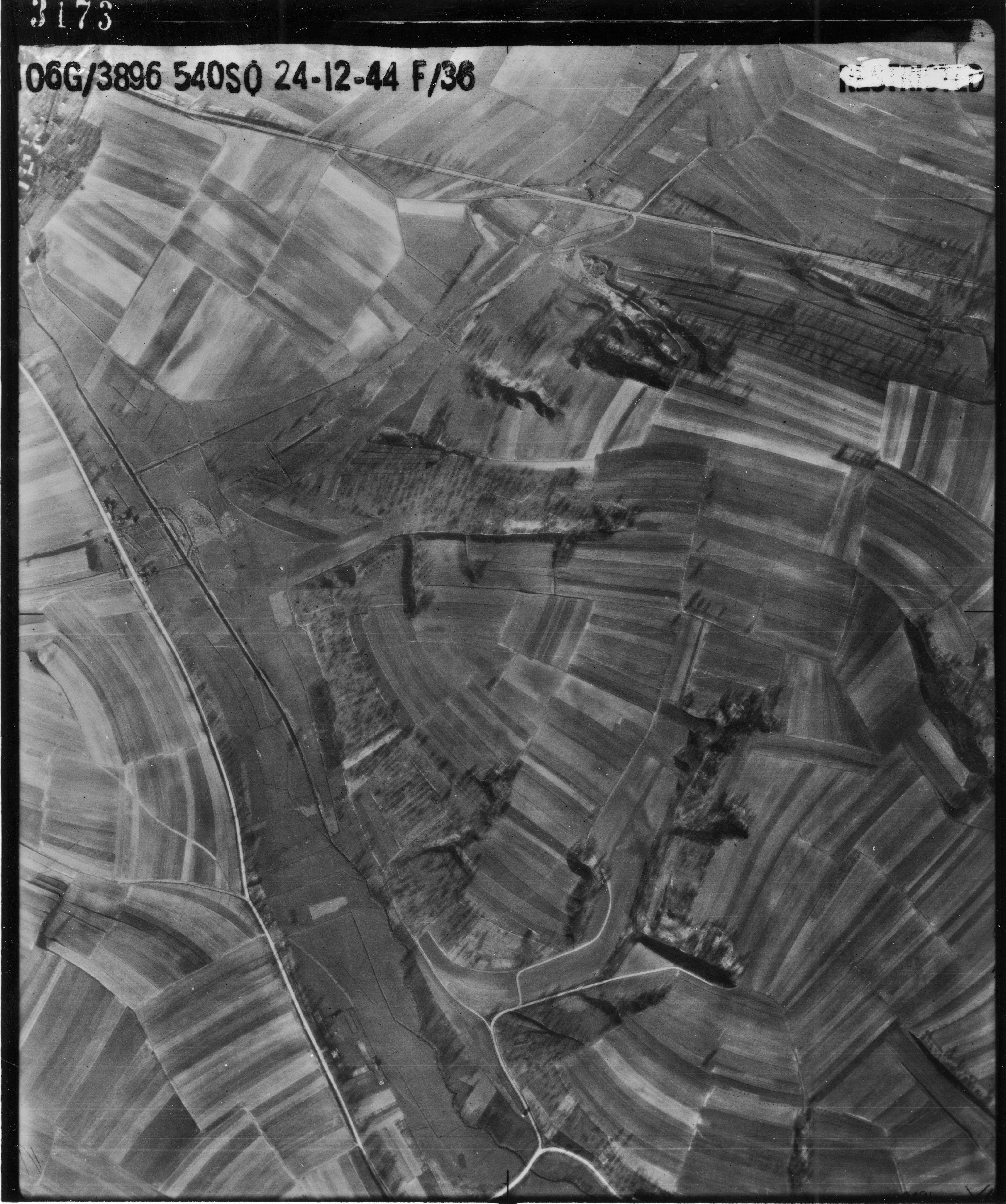 Luftbild der US-amerikanischen Luftaufklärung: Gegend zwischen Rappach und Schwabbach. Das Bild ist vermutlich eingenordet, d. h. oben=Norden, unten=Süden. Rechts unterhalb der Bildmitte ist der Geländeeinschnitt Schindersklinge erkennbar. Durch die obere Hälfte des Bildes verläuft in einem von links nach rechts ansteigenden Bogen die Trasse der damals im Bau befindlichen Reichsautobahn Heilbronn – Nürnberg. In der linken Bildhälfte verläuft die Straße Schwabbach (oben) – Rappach (unten, außerhalb des Bildes). Die Bebauung von Rappach reicht heute von Süden her bis an den Rand der Schindersklinge.